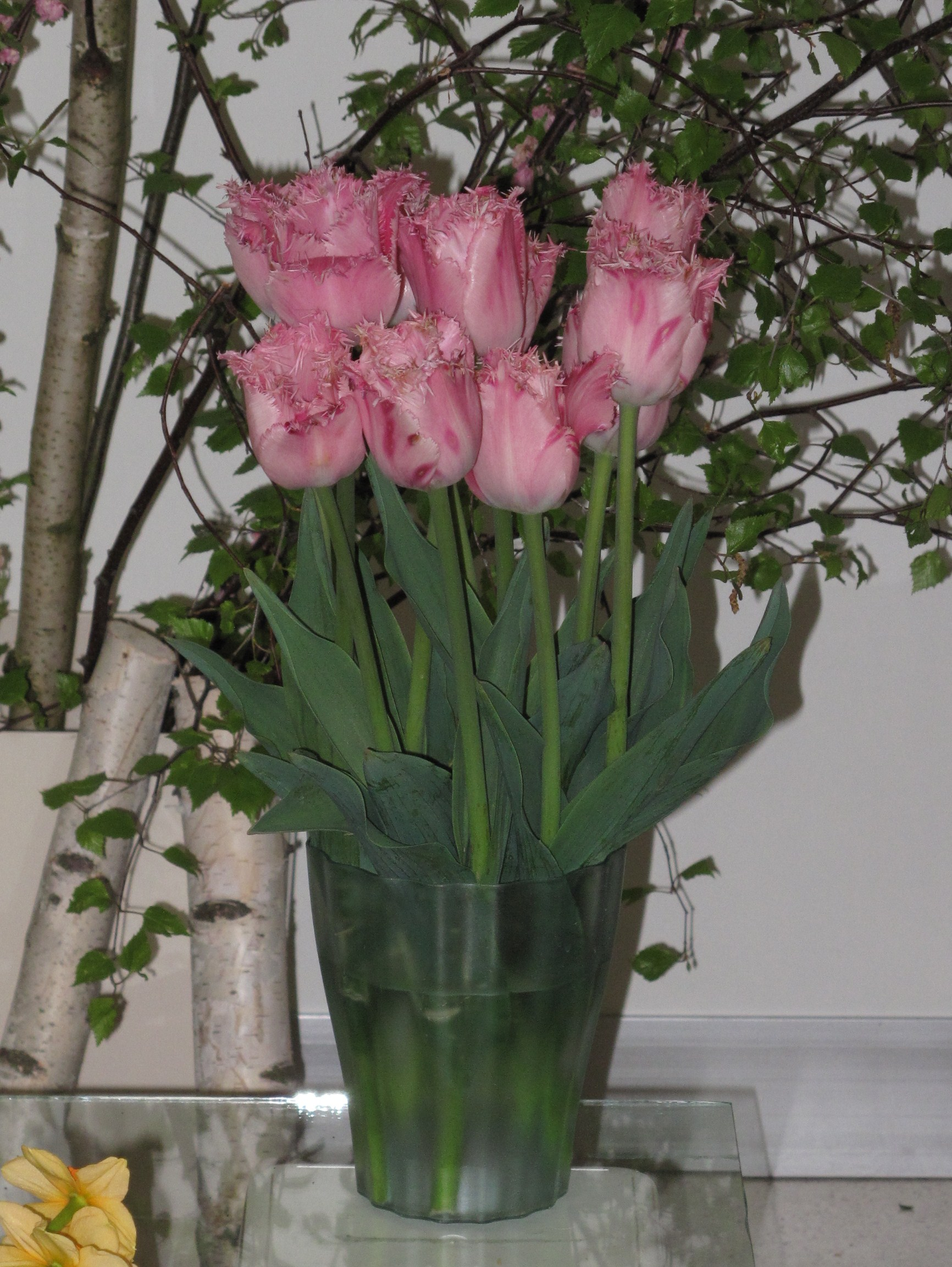 Kultivar 'Santander' rodu Tulipán (Tulipa). Veletrh Narcis 2016, Lysá Nad Labem, Česká republika.